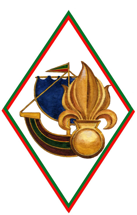 Insigne du Groupement du recrutement de la Légion étrangère